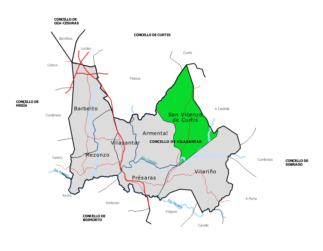 Mapa da parroquia de San Vicenzo de Curtis no concello de Vilasantar (Galiza).